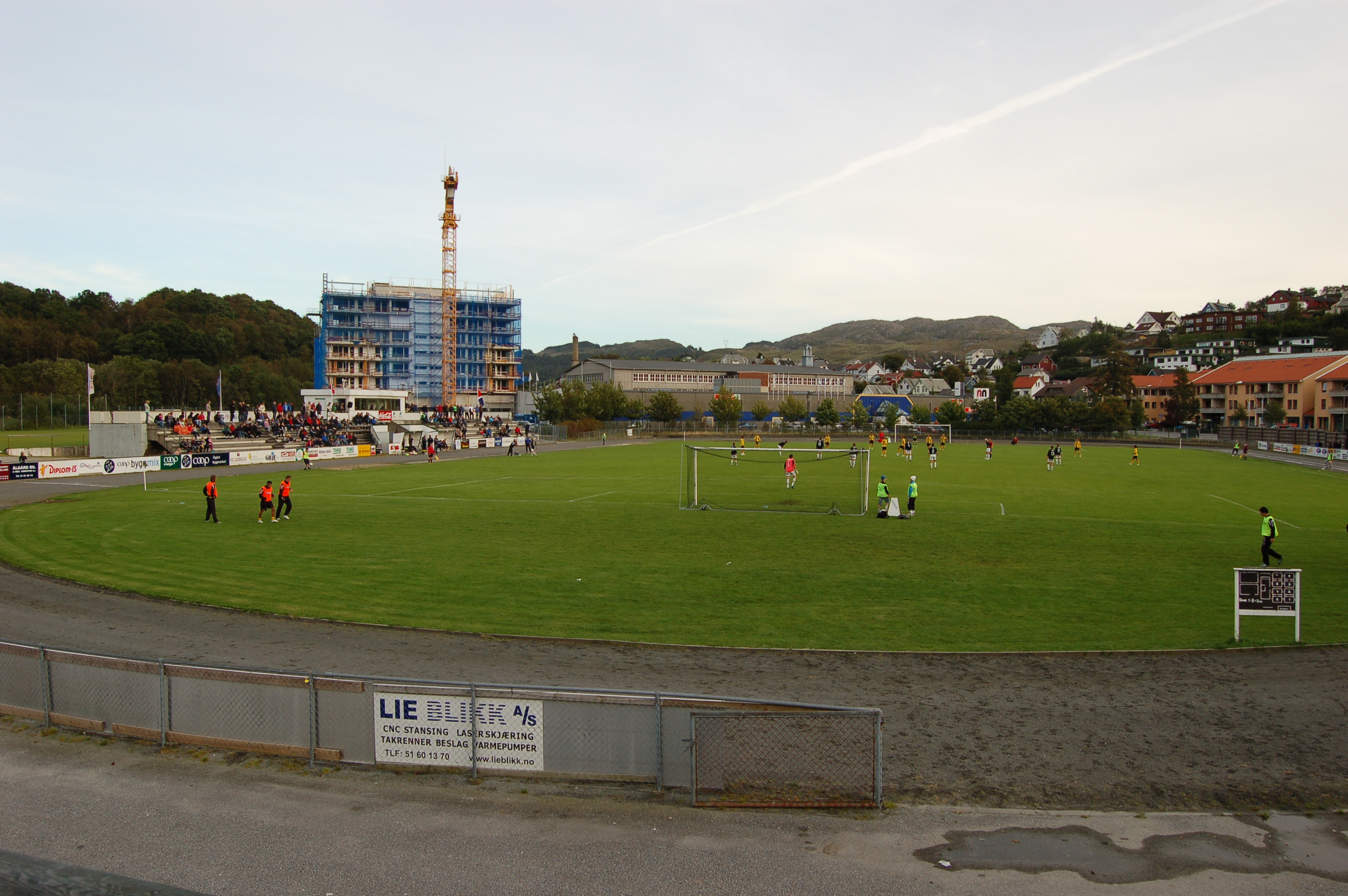 Ålgård stadion, Ålgård